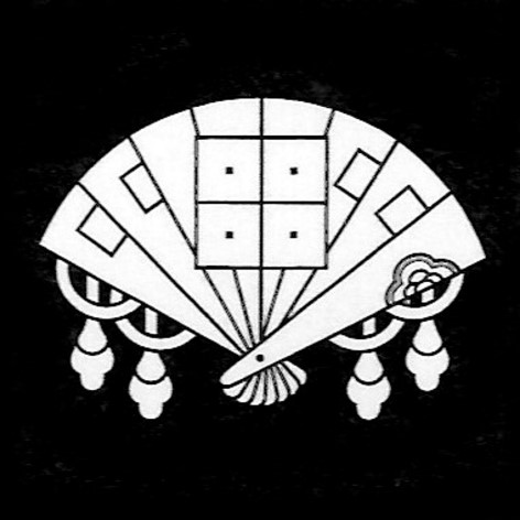 Crest of Yamazaki Daimyo